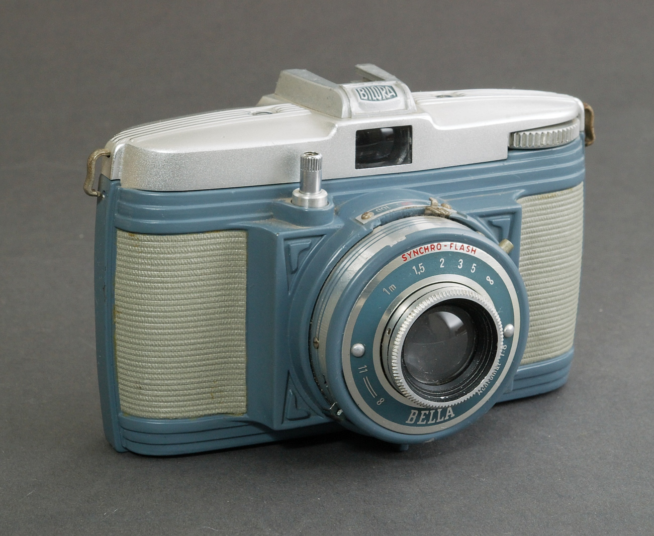 Bilora Bella, Vorderseite, Kamera für Rollfilm 127, Druckgussgehäuse, Achromat, Schnappverschluß 1/100s, 1/50s und B, Blitzsynchronkontakt, Auslösesperre